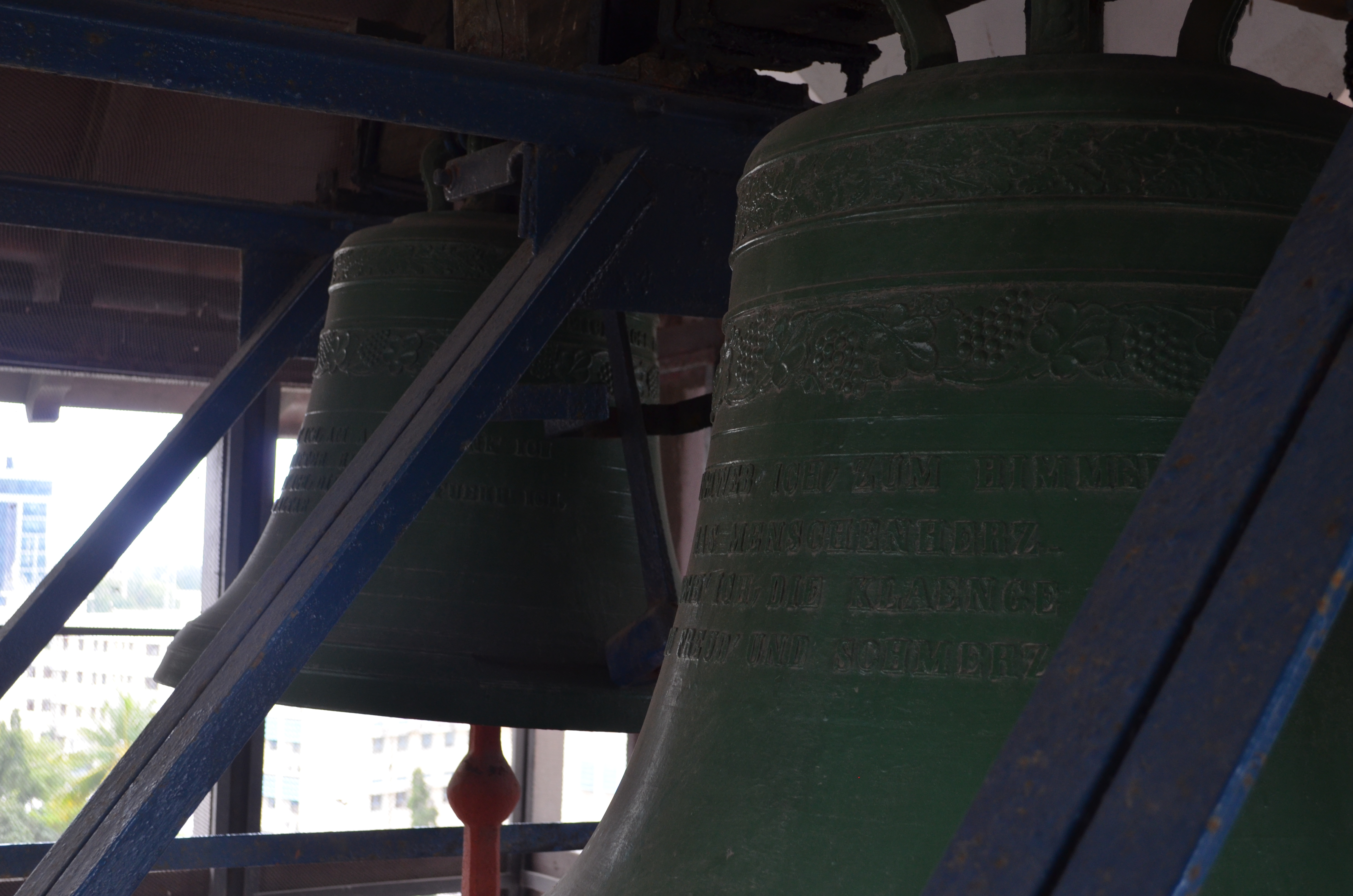 Kyrkklocka